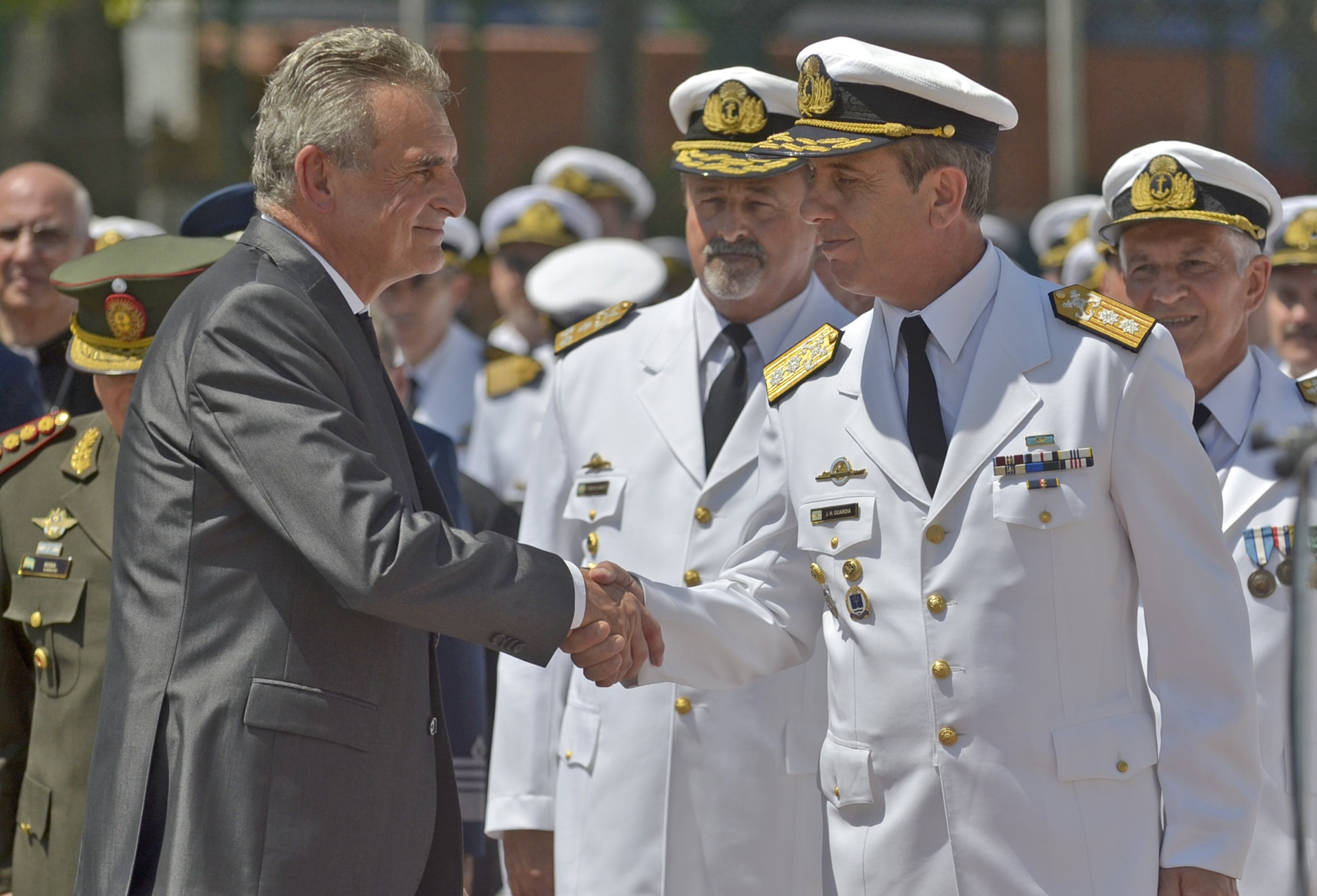 El ministro de Defensa Agustín Rossi, felicitando al nuevo Jefe del Estado Mayor General de la Armada.